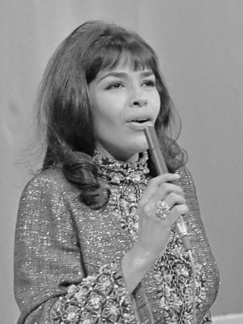 TV: Muziek is troef , Wilma Reading 5 januari 1972